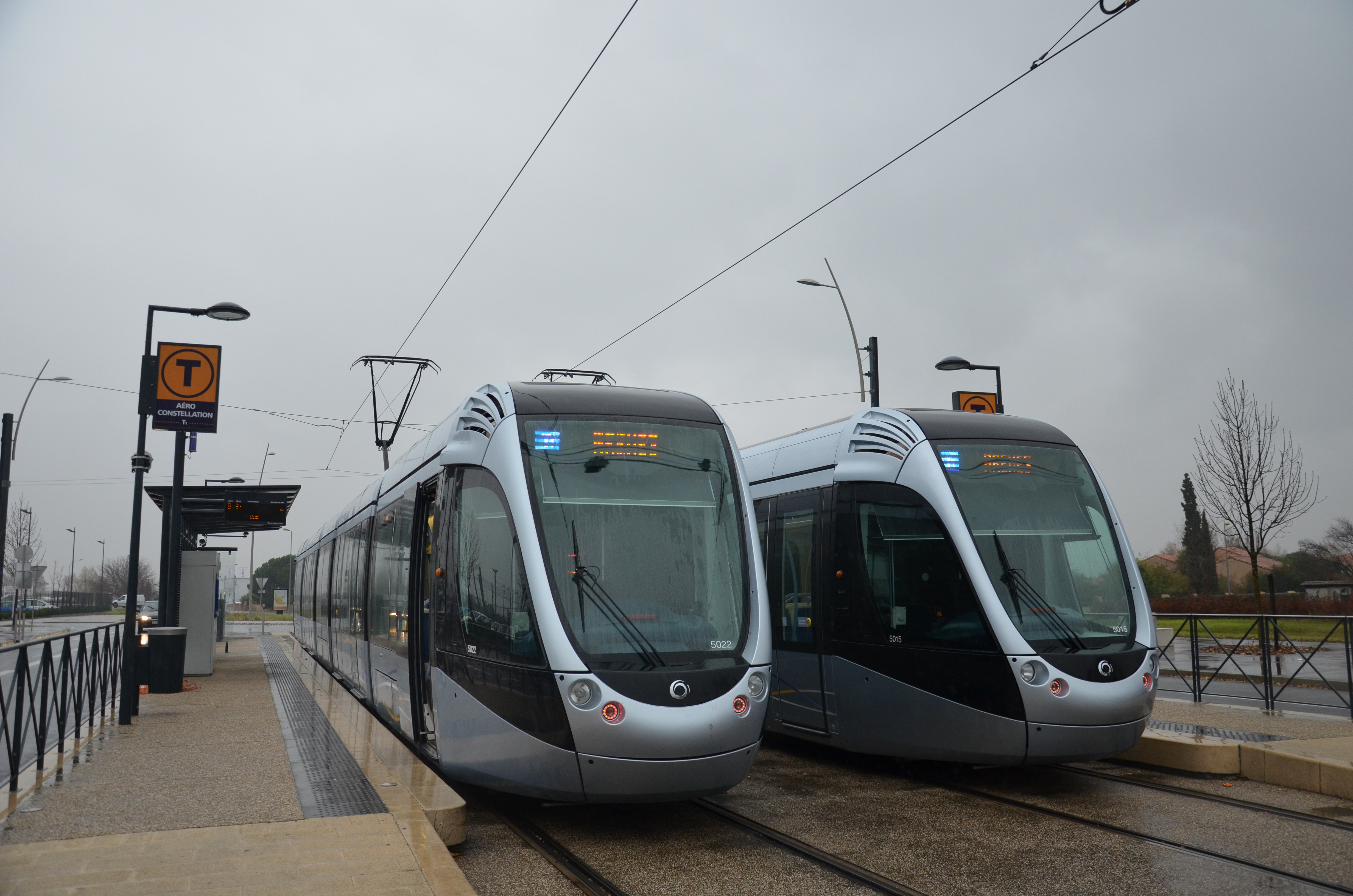 Alstom Citadis 302 n°5022 + 5015 au terminus de la ligne T1 TISSEO, Aéroconstellation.